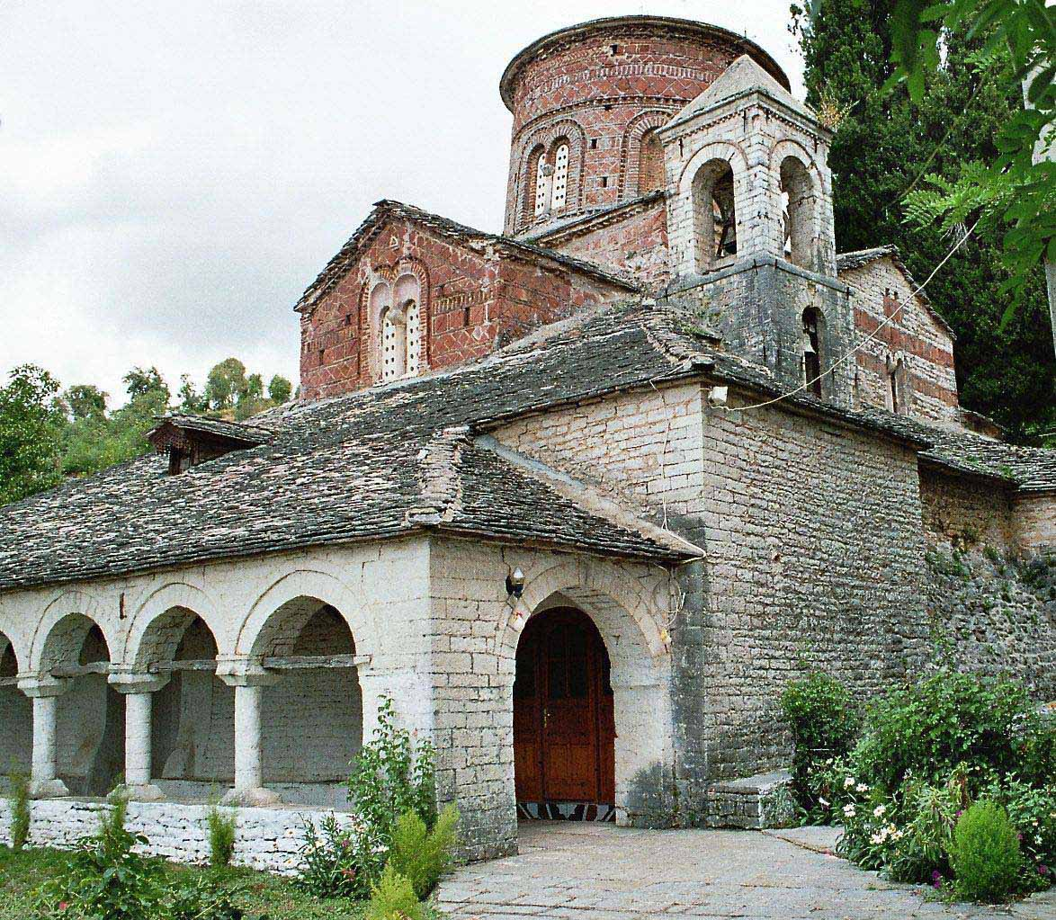 Orthodoxe Marienkirche in Labova (Albanien), bekannt als Aufbewahrungsort einer Kreuz-Reliquie, der Tradition nach gestiftet von Kaiser Justinian im 6. Jhdt., heutige Bausubstanz ca. 10. Jhdt.